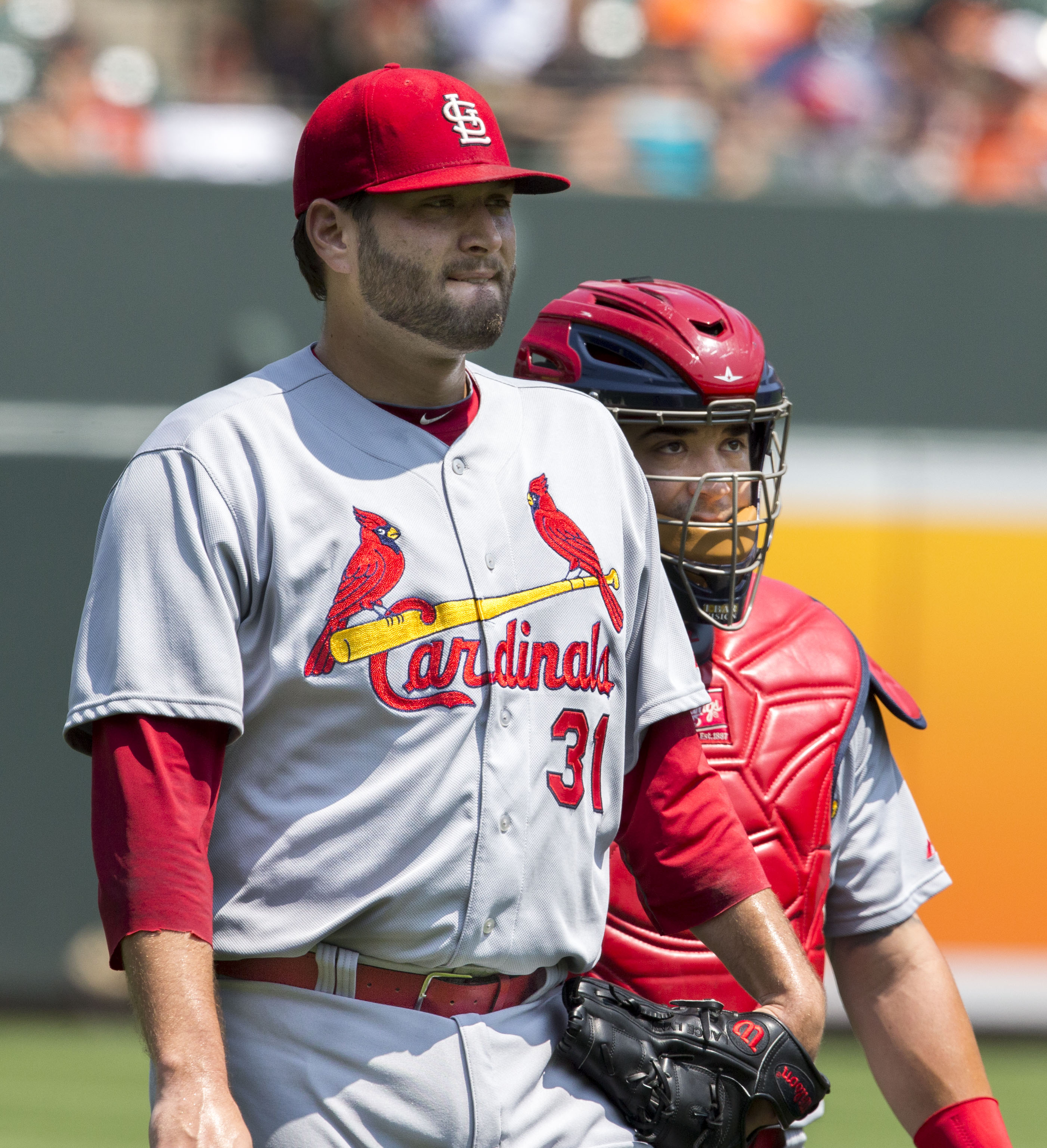 Cardinals at Orioles 8/10/14